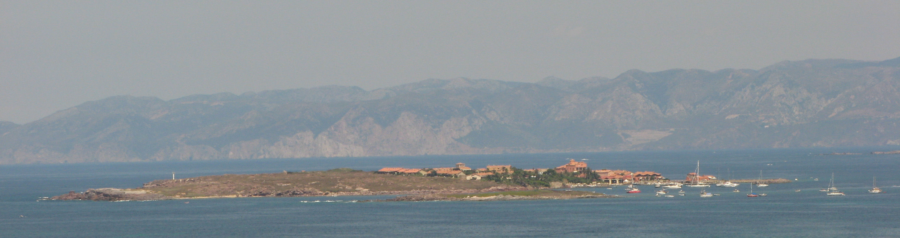 Isola piana,(Arcipelago del Sulcis, Sardegna, Italy)